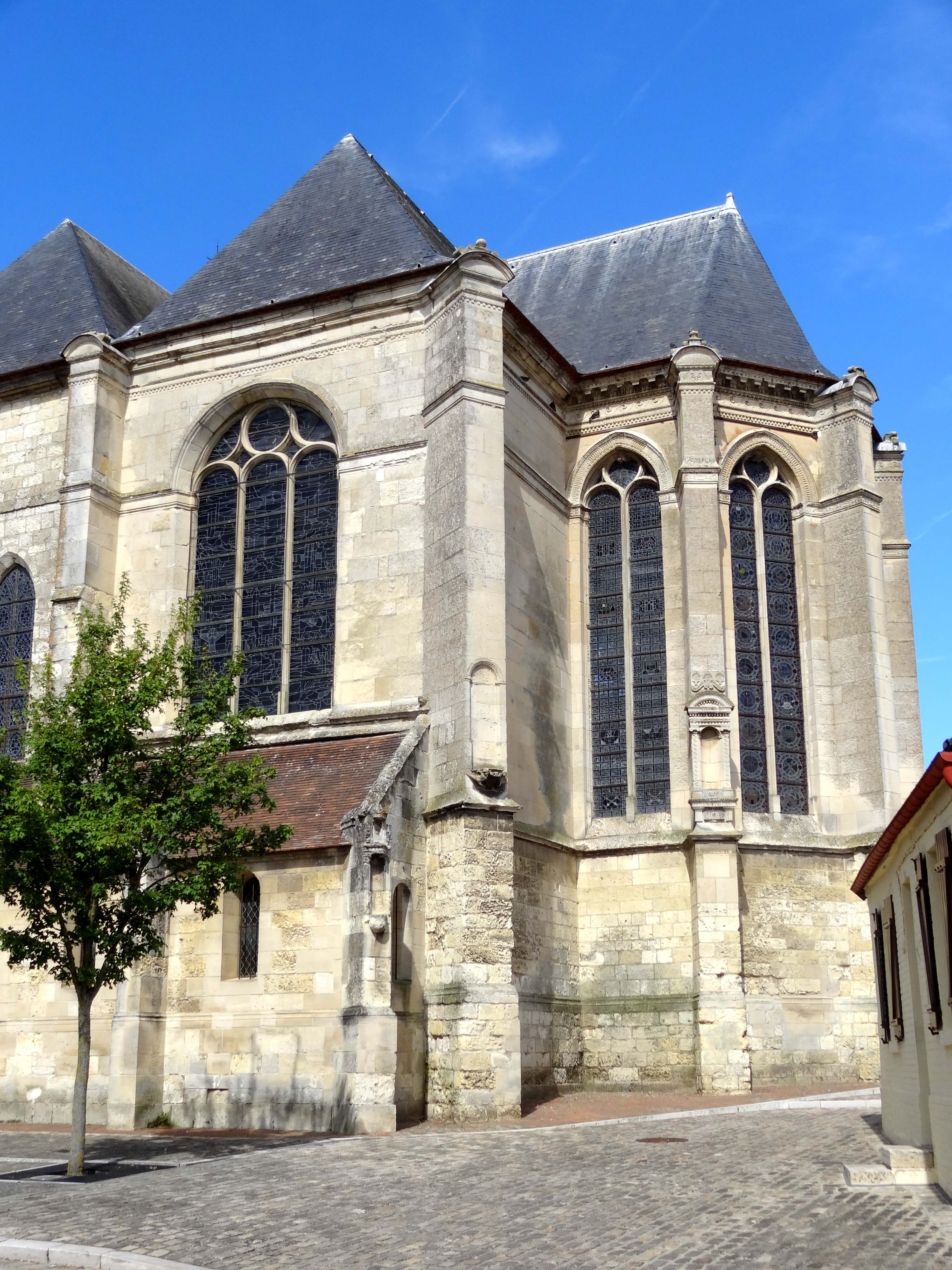 Église Saint-Denis de Remy - voir titre.